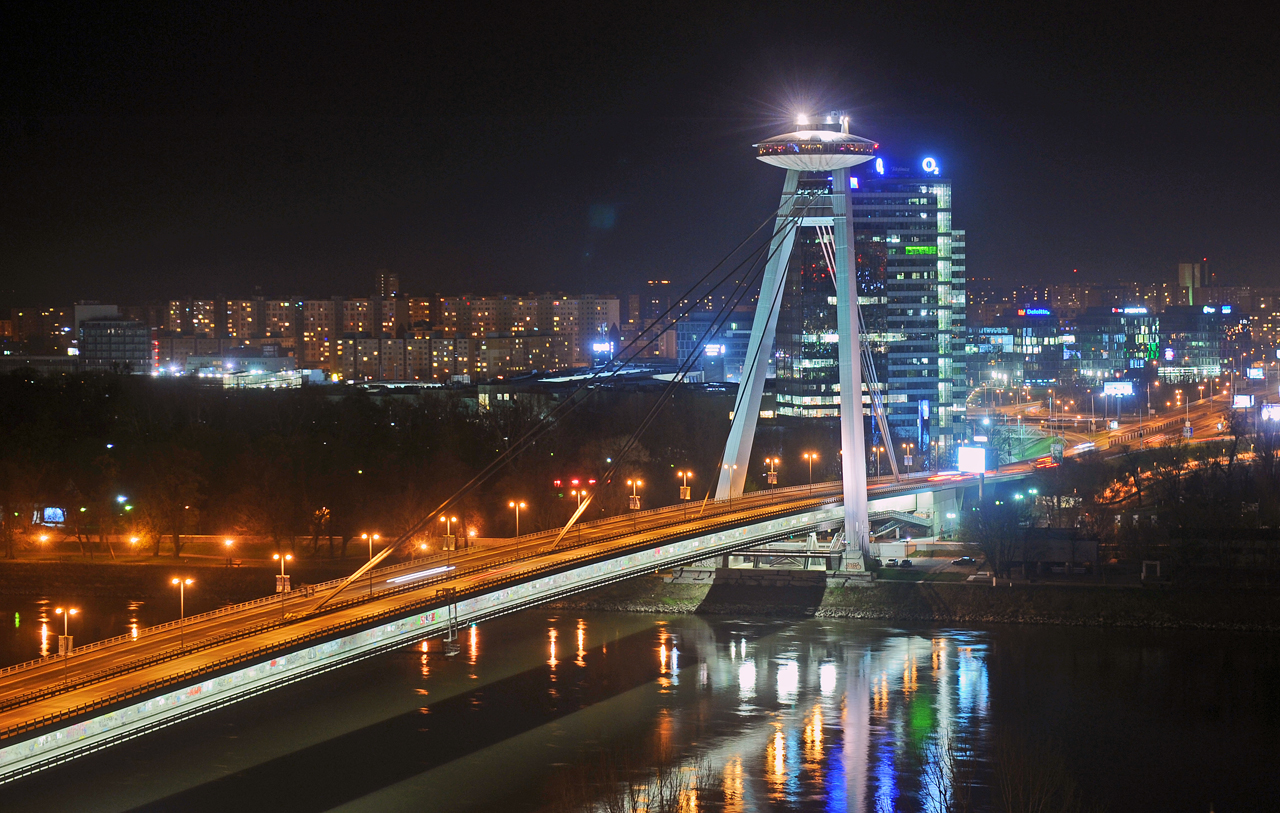 Bratislava - Most SNP